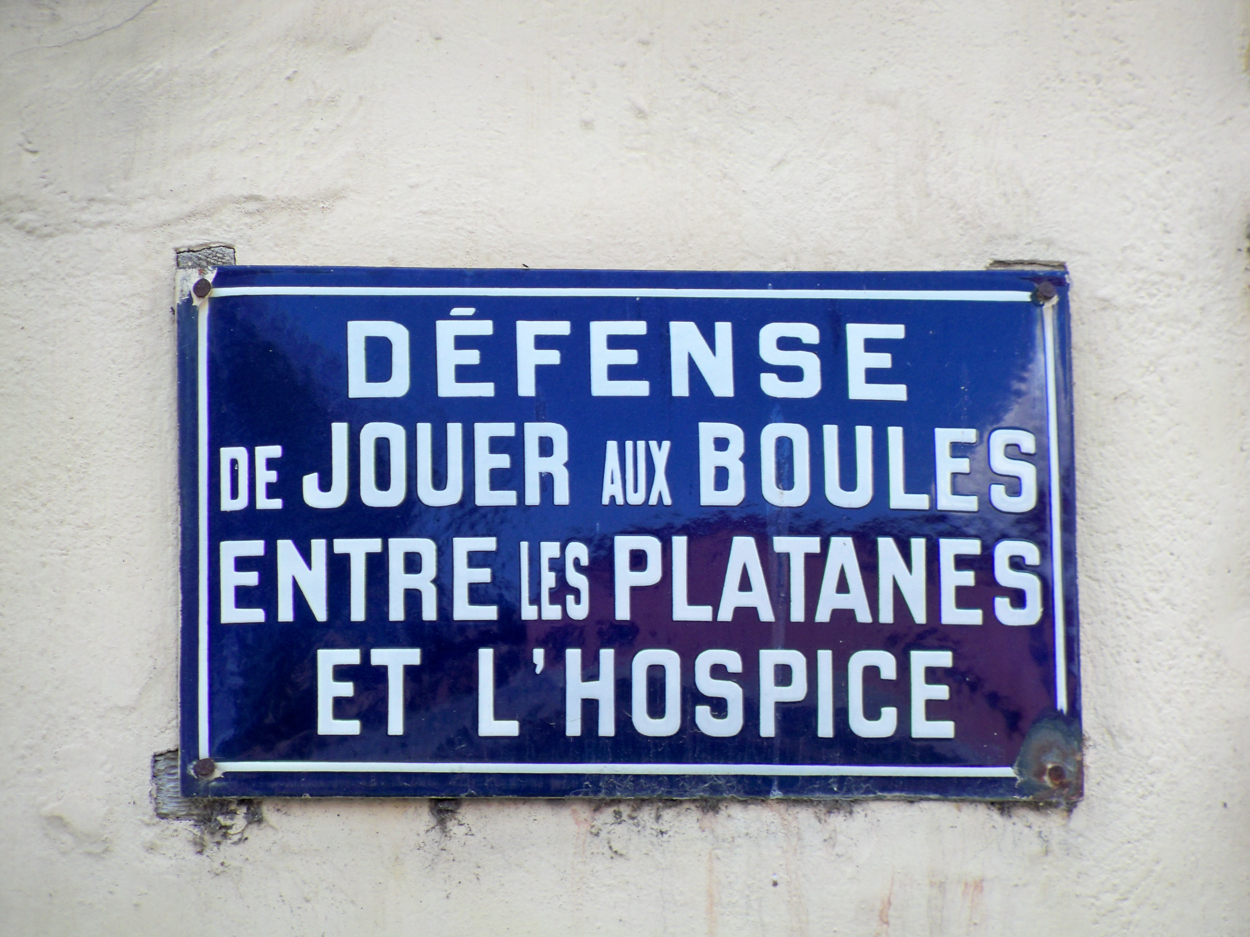 plaque à Mane (04)